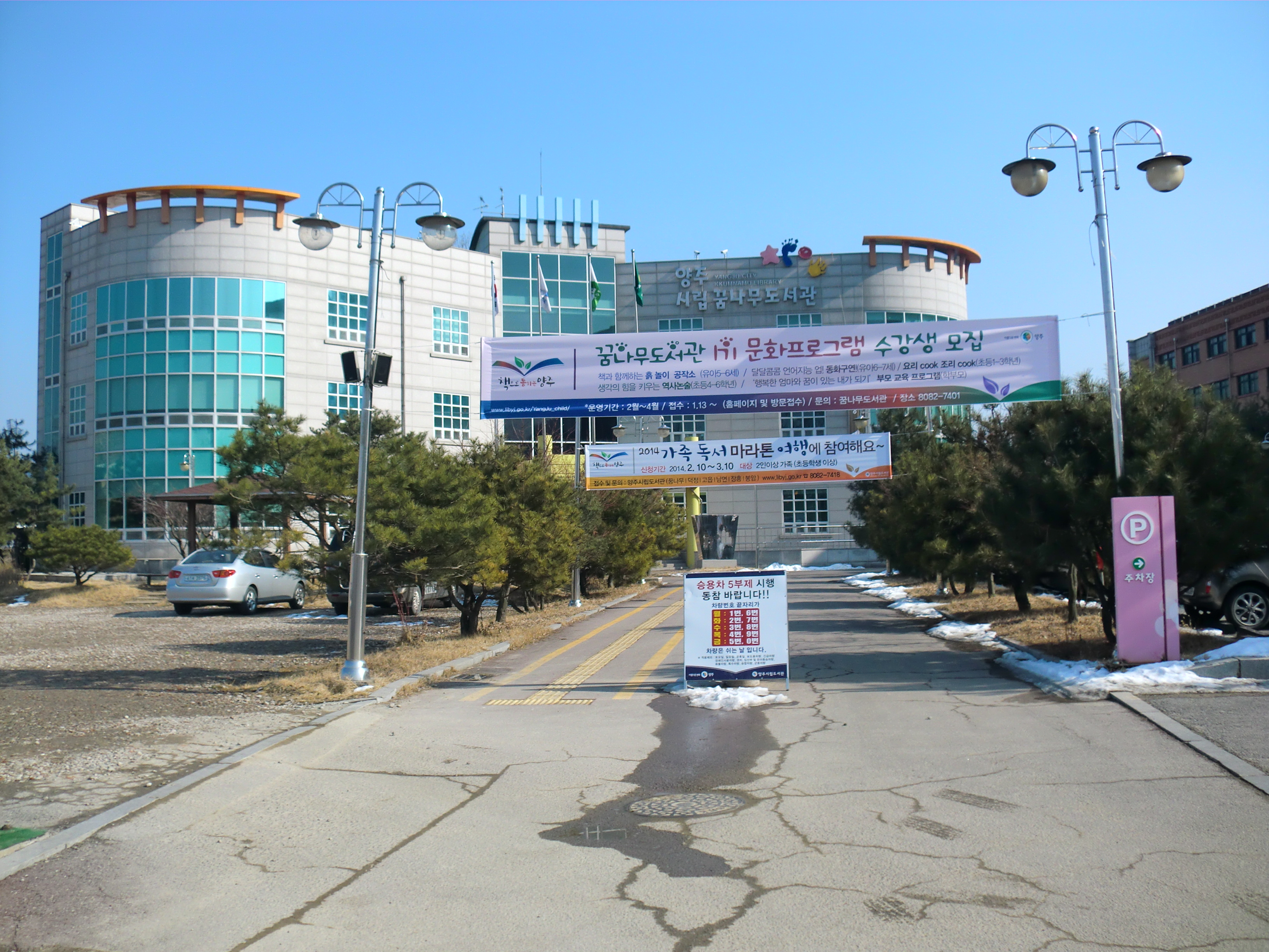 경기도 양주시에 있는 양주꿈나무도서관